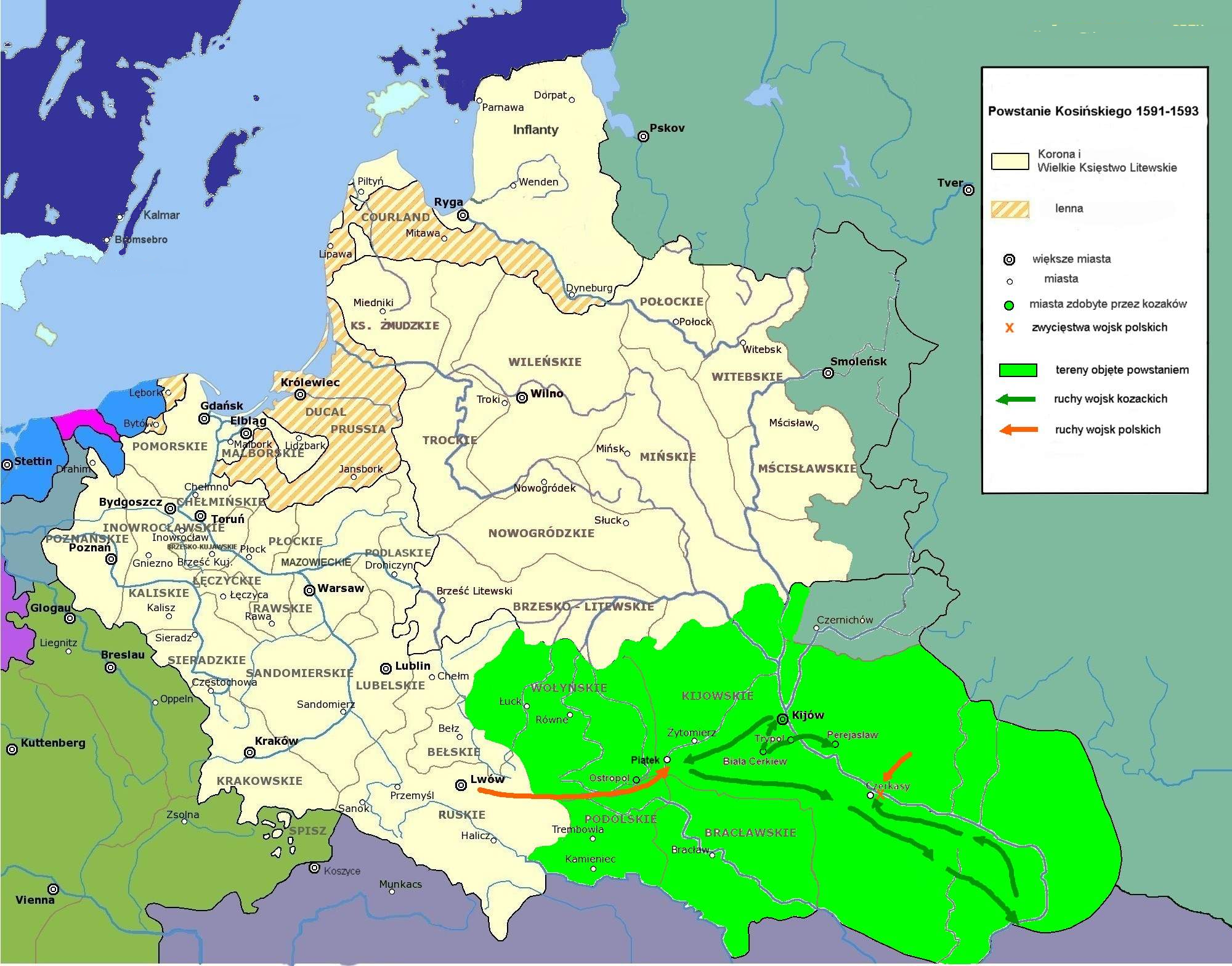 Powstanie Kosińskiego author: User:Mathiasrex Maciej Szczepańczyk, based on layers of User:Halibutt